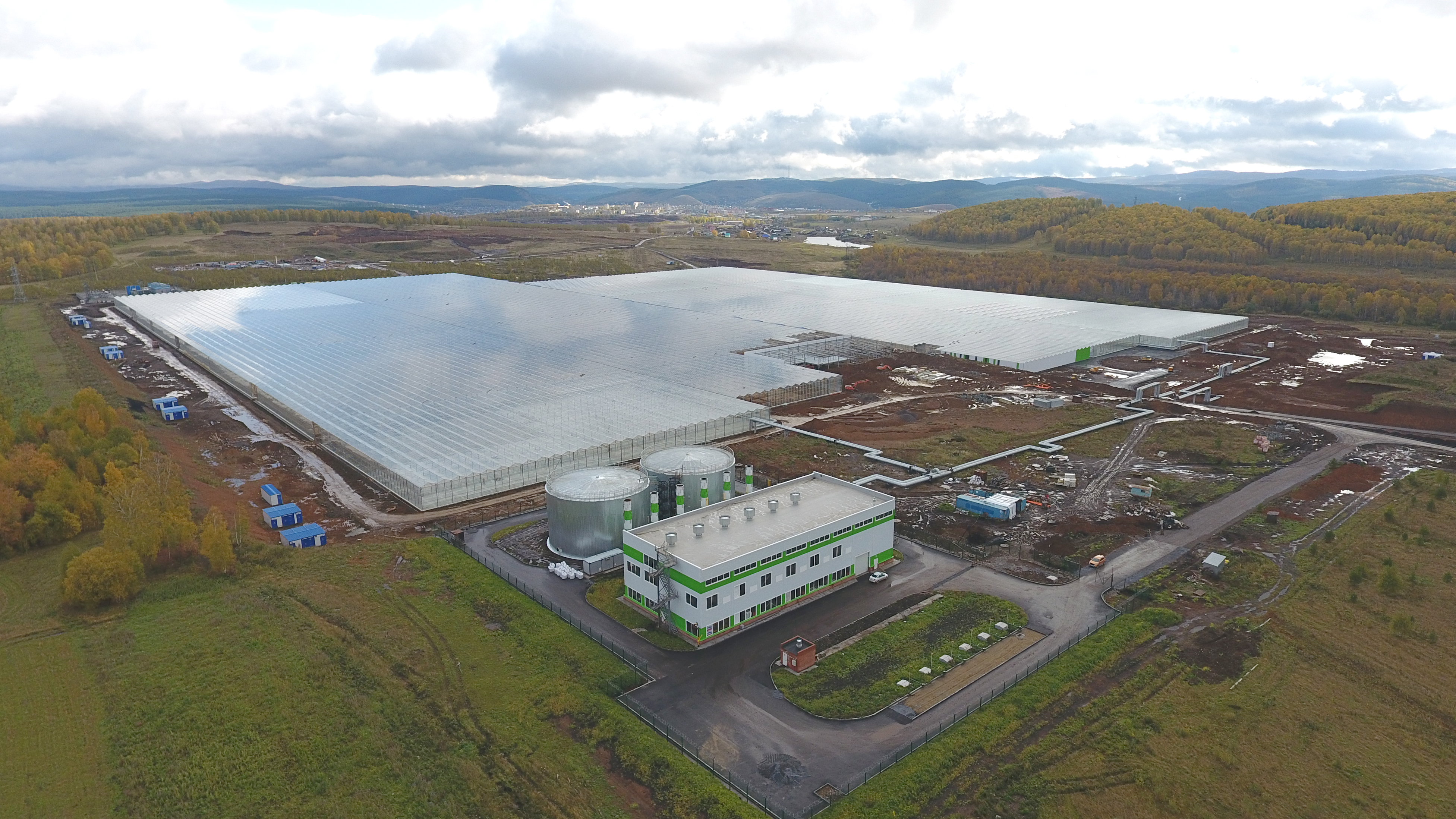 Производственная площадка Агрокомплекс "Горный"